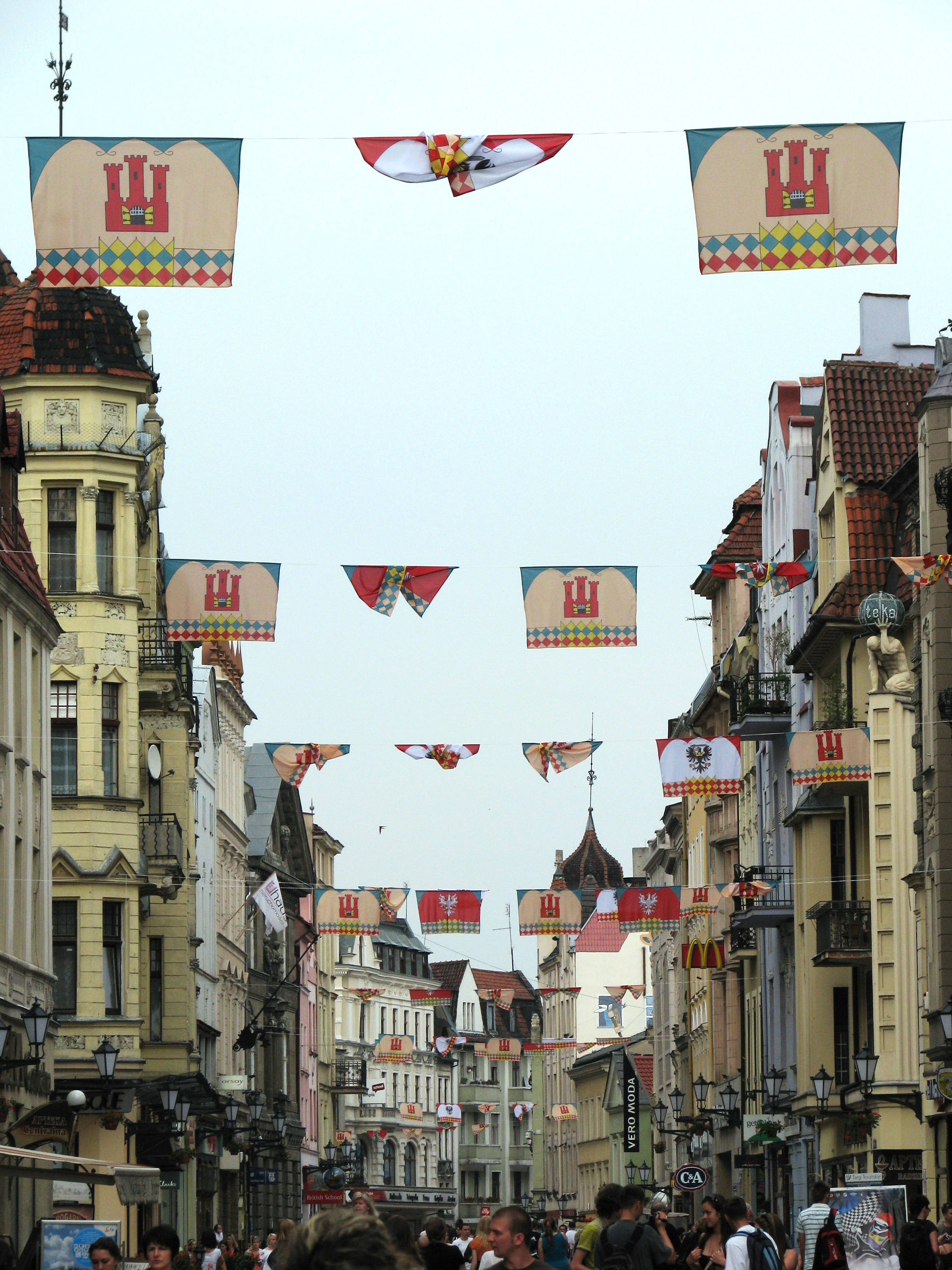 Toruń - ulica Szeroka w zespole dzielnicy staromiejskiej